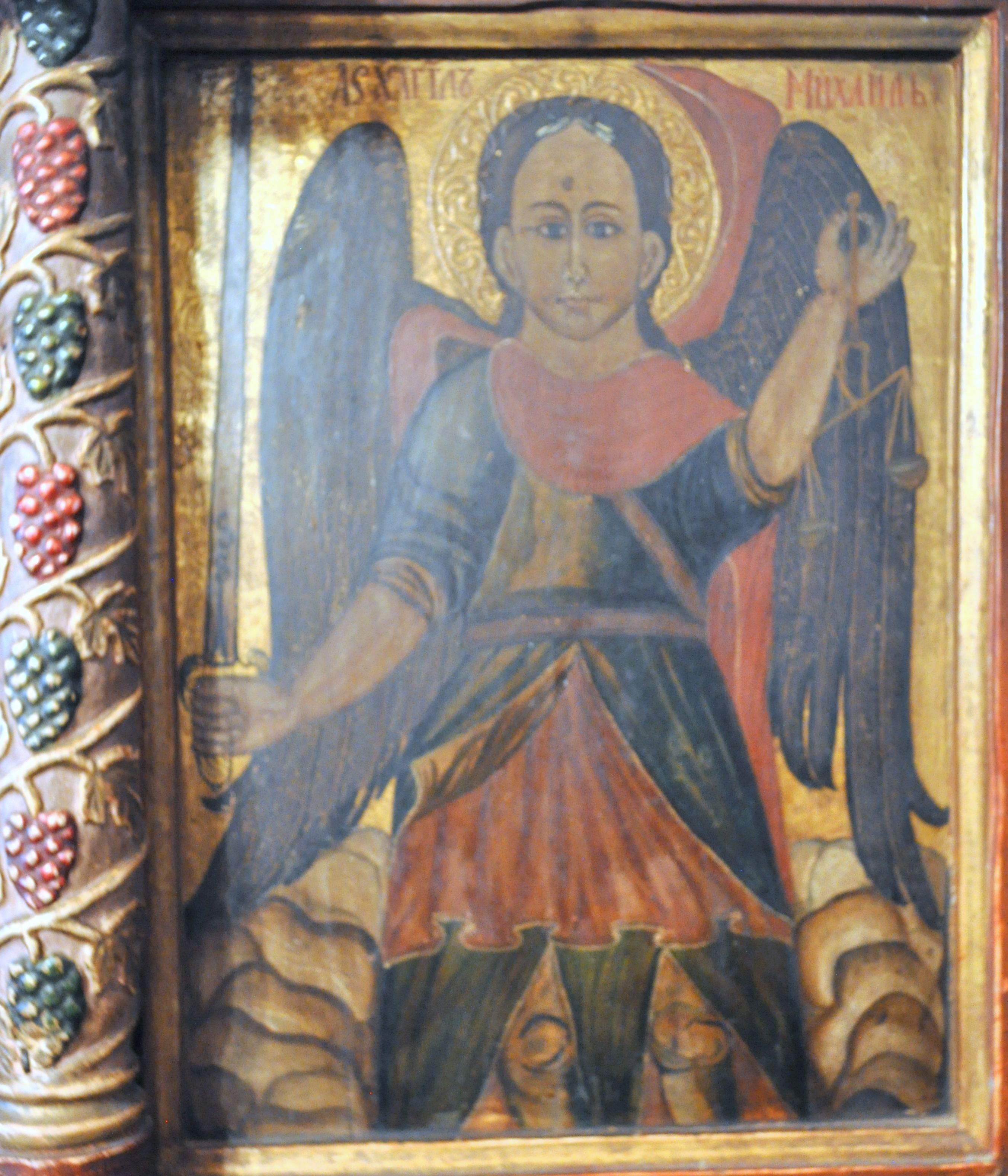 Biserica de lemn „Sfinții Arhangheli” din Reghin, județul Mureș